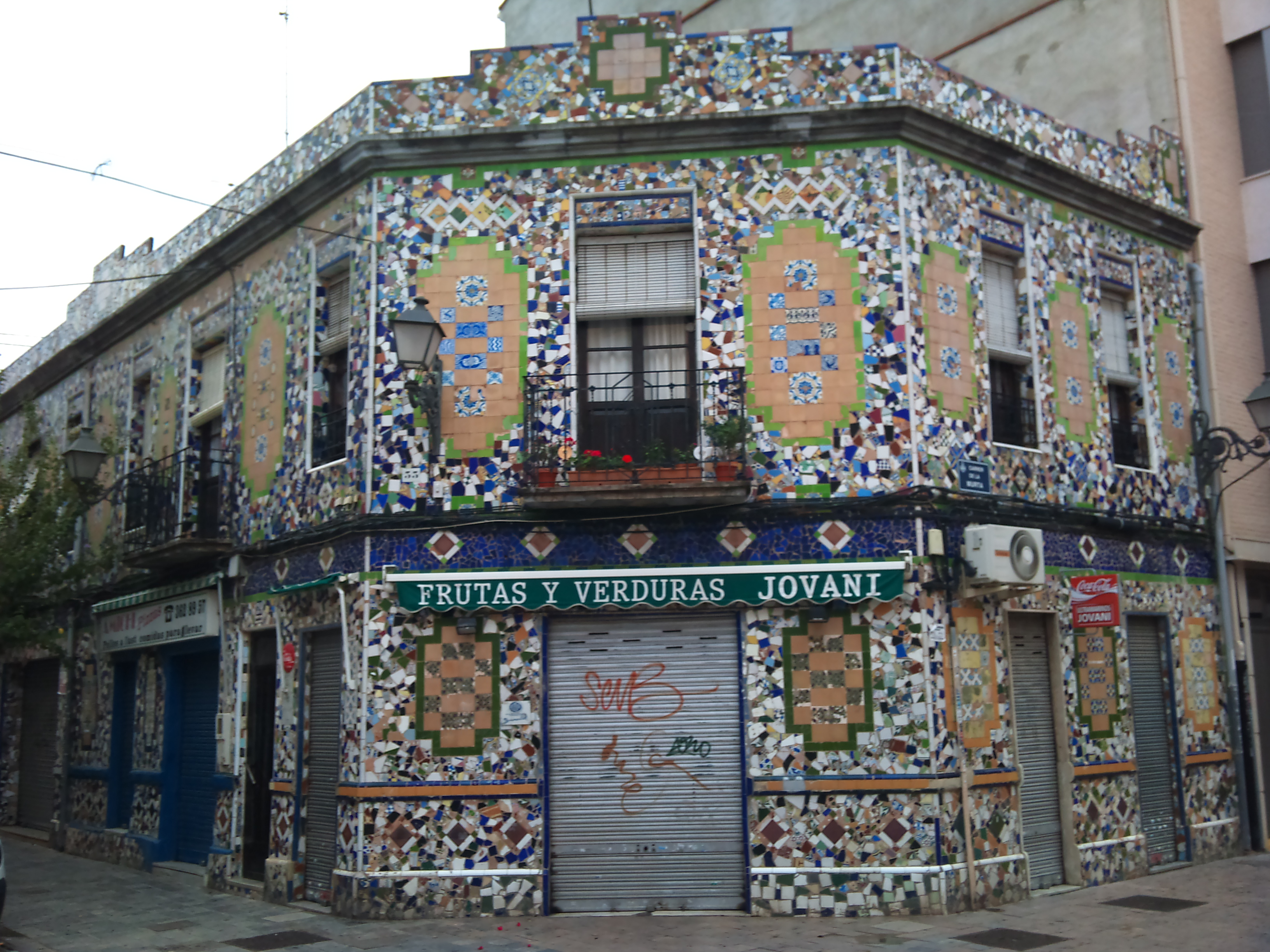 Casa decorada amb rajoletes a una cantonada del carrer Murta